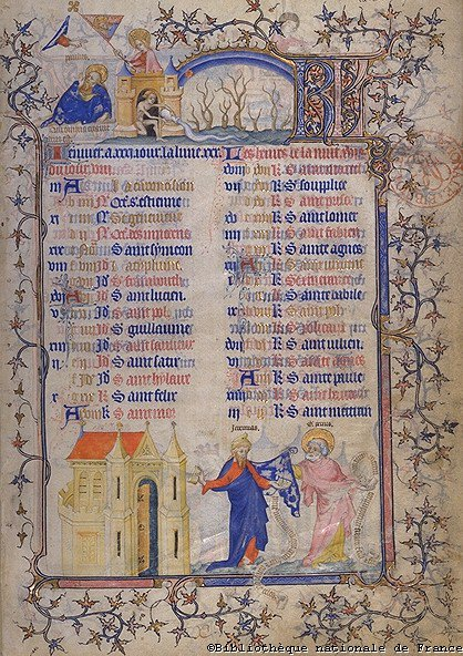 14. századi francia kalendárium Párizsból